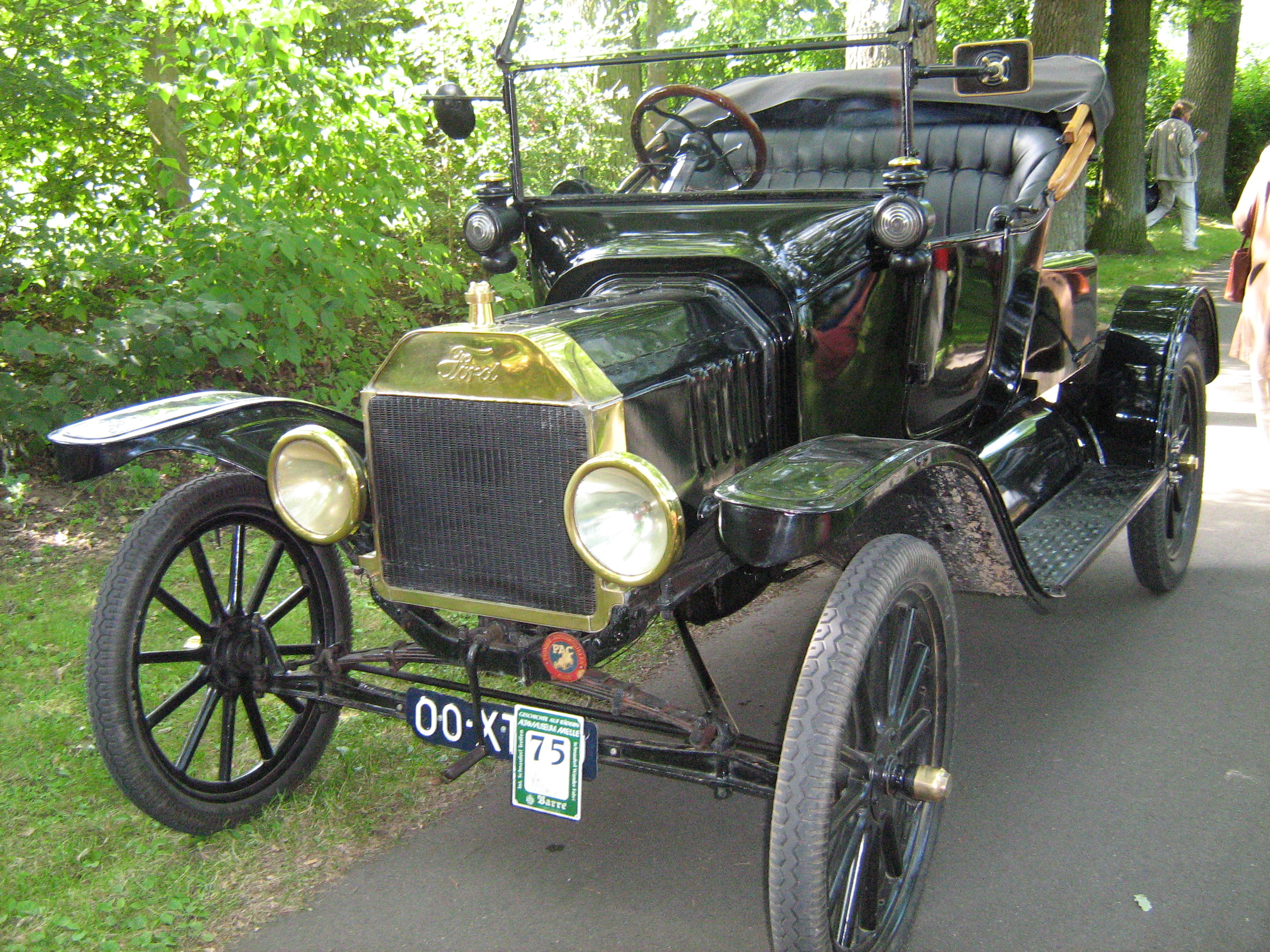 1915-1916 Ford Model T Runabout